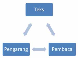 bagian-bagian yang perlu diperhatikan dalam interpretasi